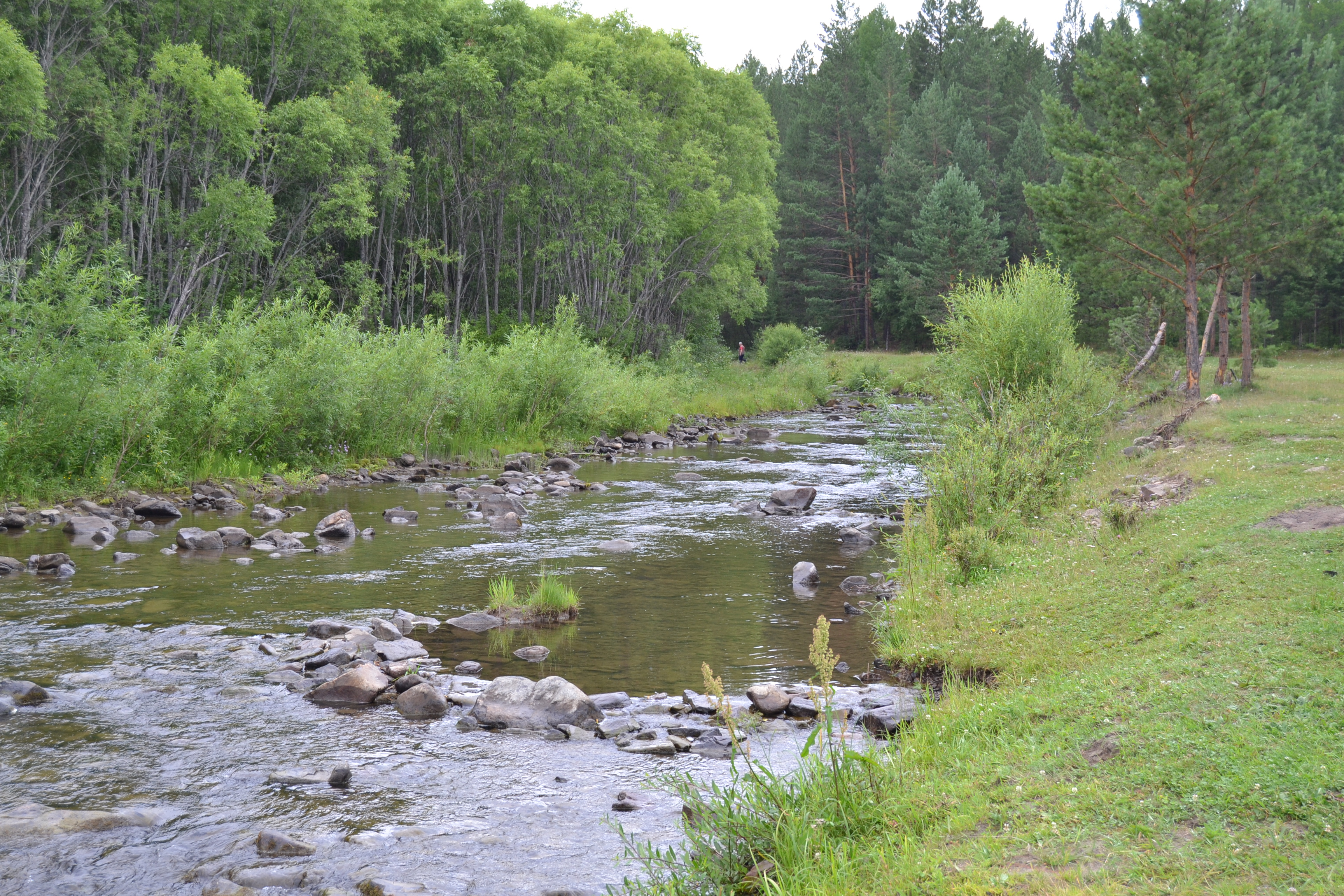 Куйтунка в 10 метрах от устья в Иркуте